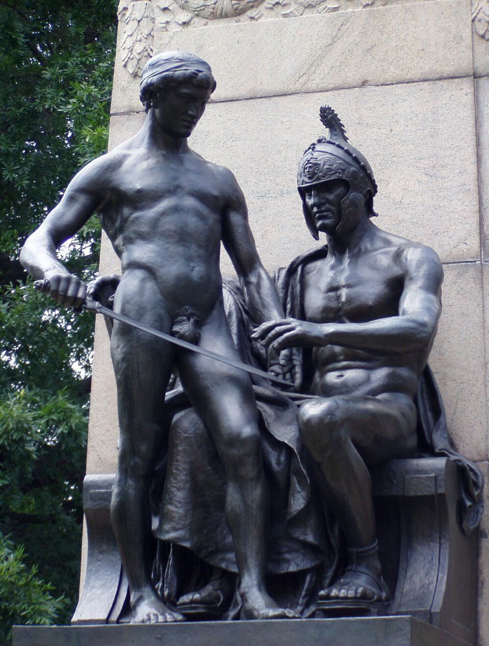 Friederich Wilhelm von Steuben statue, in Lafayette Park, Washington, DC(detail) „Military Instruction“ genannt, hält ein sitzender nackter Soldat mit aufwendig gestaltetem Helm, „in der Blütezeit des Lebens“, eine leere Schwertscheide in einer Hand. Mit seiner anderen Hand, als ob er Anweisungen gebe, zeigt er auf sein gezücktes Schwert, das von einem nackten jungen Mann daneben gehalten wird.